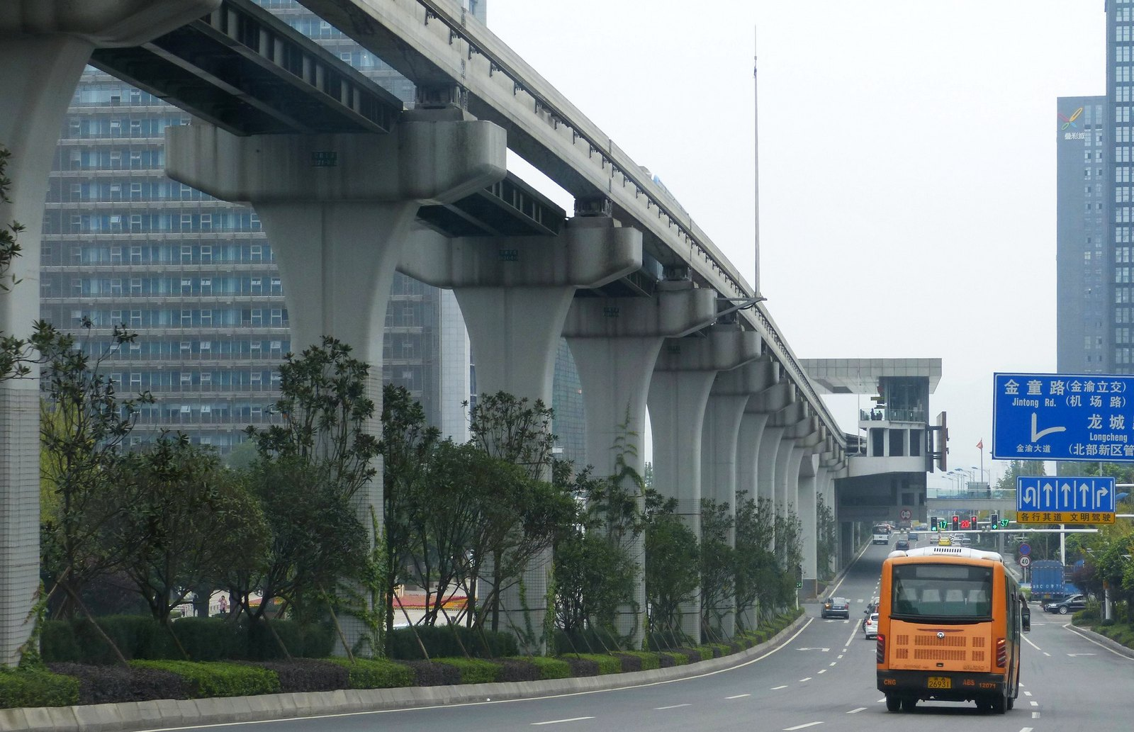 Chongqing Monorail Konstruktion